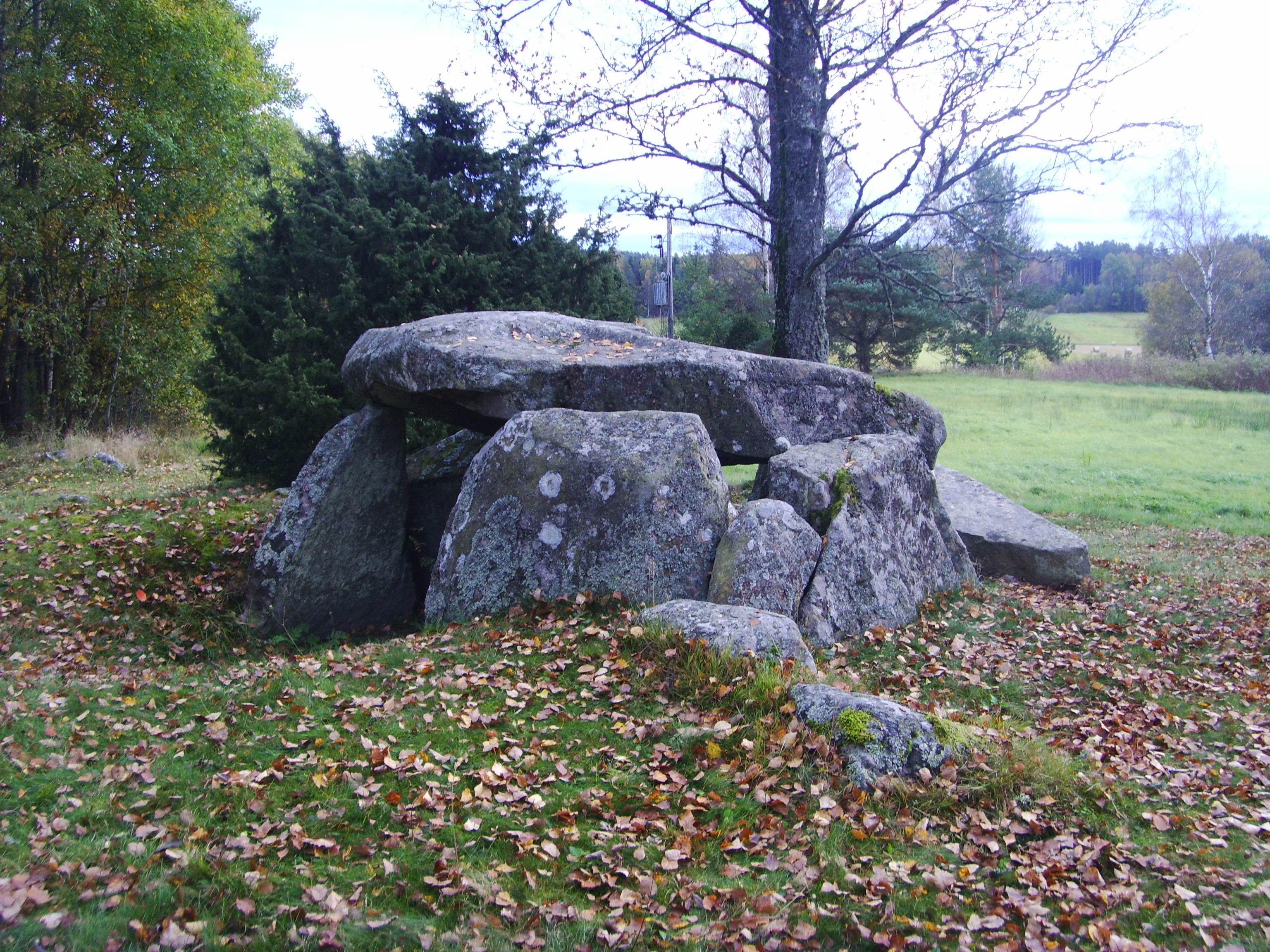 Masslebergs fornlämningsområde i Strömstads kommun, med en megalitgrav med skålgropar på takhällen, två hällristningsytor och ett järnåldersgravfält. I närheten finns också ryggade åkrar. Bland ristningsmotiven finns en tydlig överhuggning.